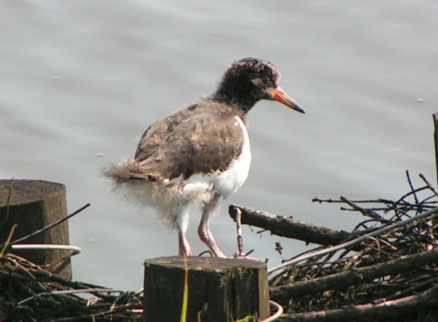 a juvenile Haematopus ostralegus